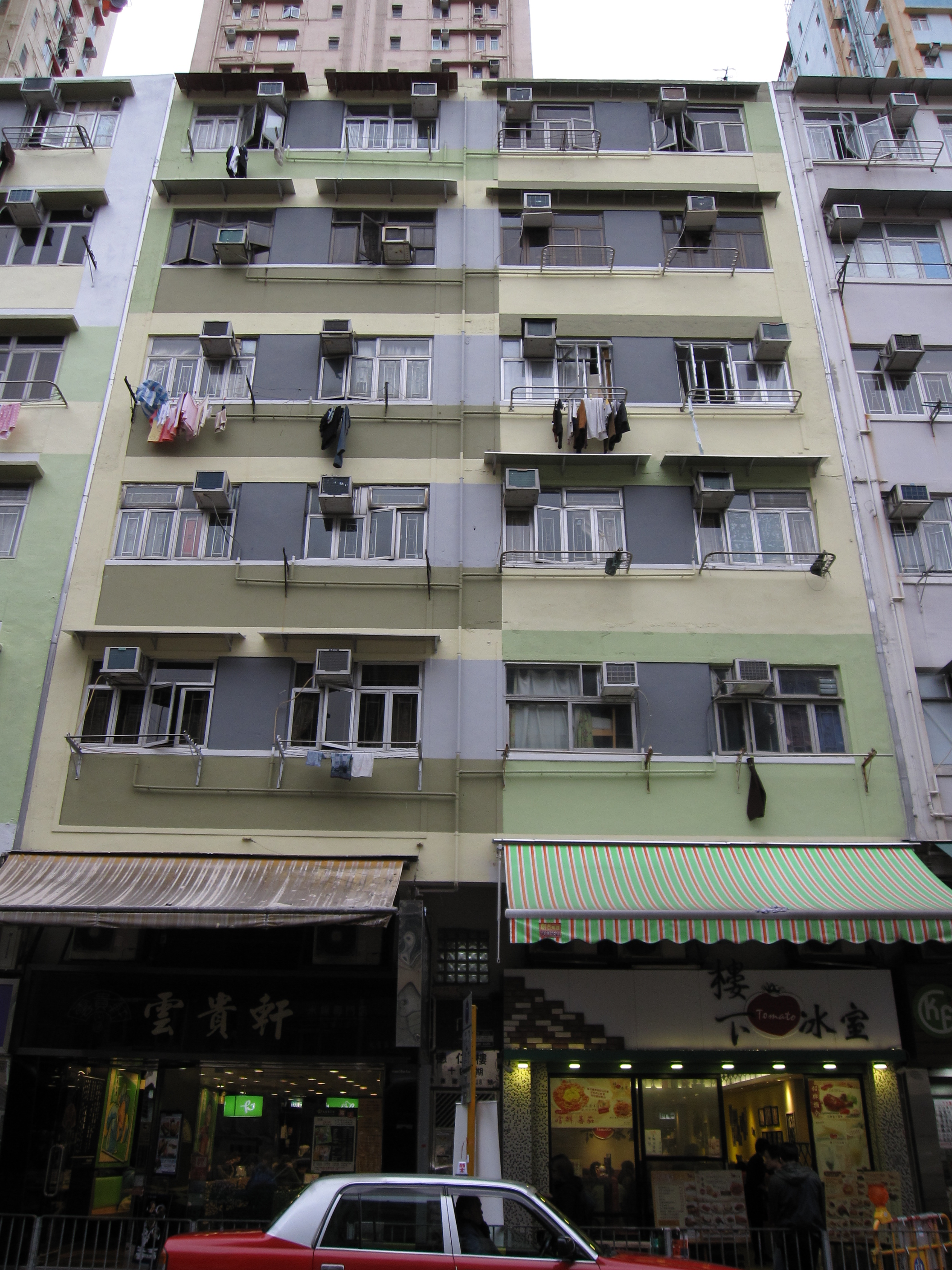 中文（香港）: 德仁樓第十四期。